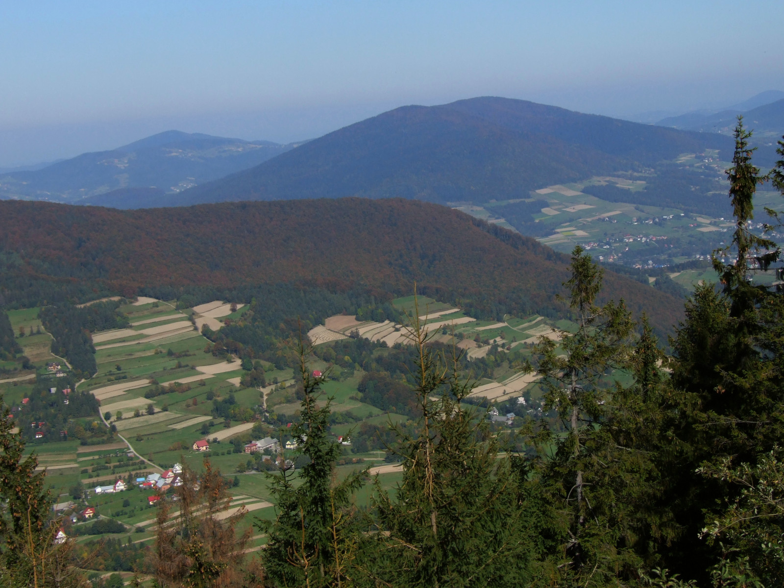 Widok z Lubonia Wielkiego. Na pierwszym planie Szczebel, w głębi po prawej Lubogoszcz, a po jego lewej stronie Zembalowa